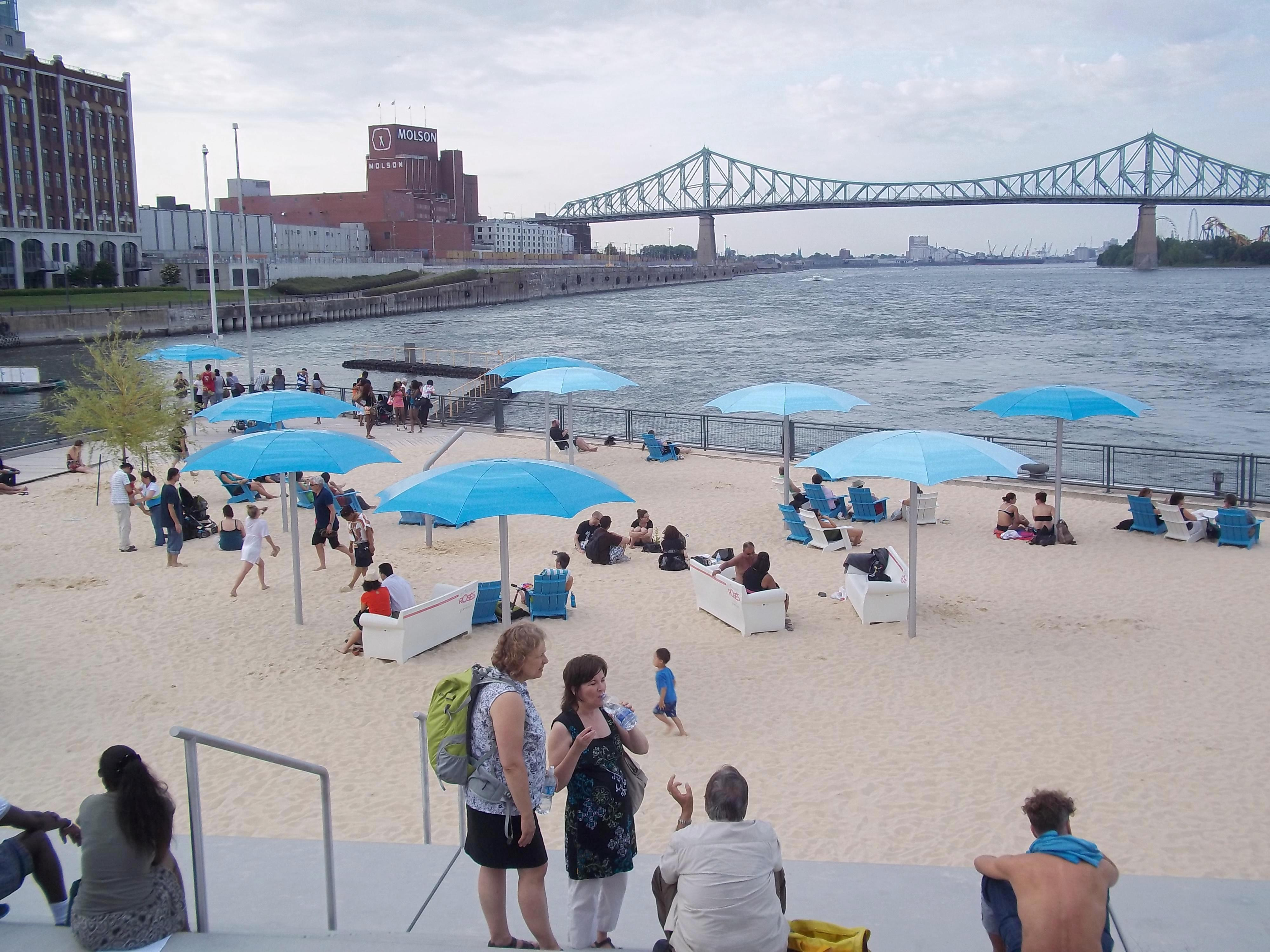 Située à quelques pas du quartier historique, la plage urbaine du Vieux-Port de Montréal offre une ambiance de vacances avec son sable fin, ses chaises, ses parasols et la fraîcheur de ses brumisateurs.